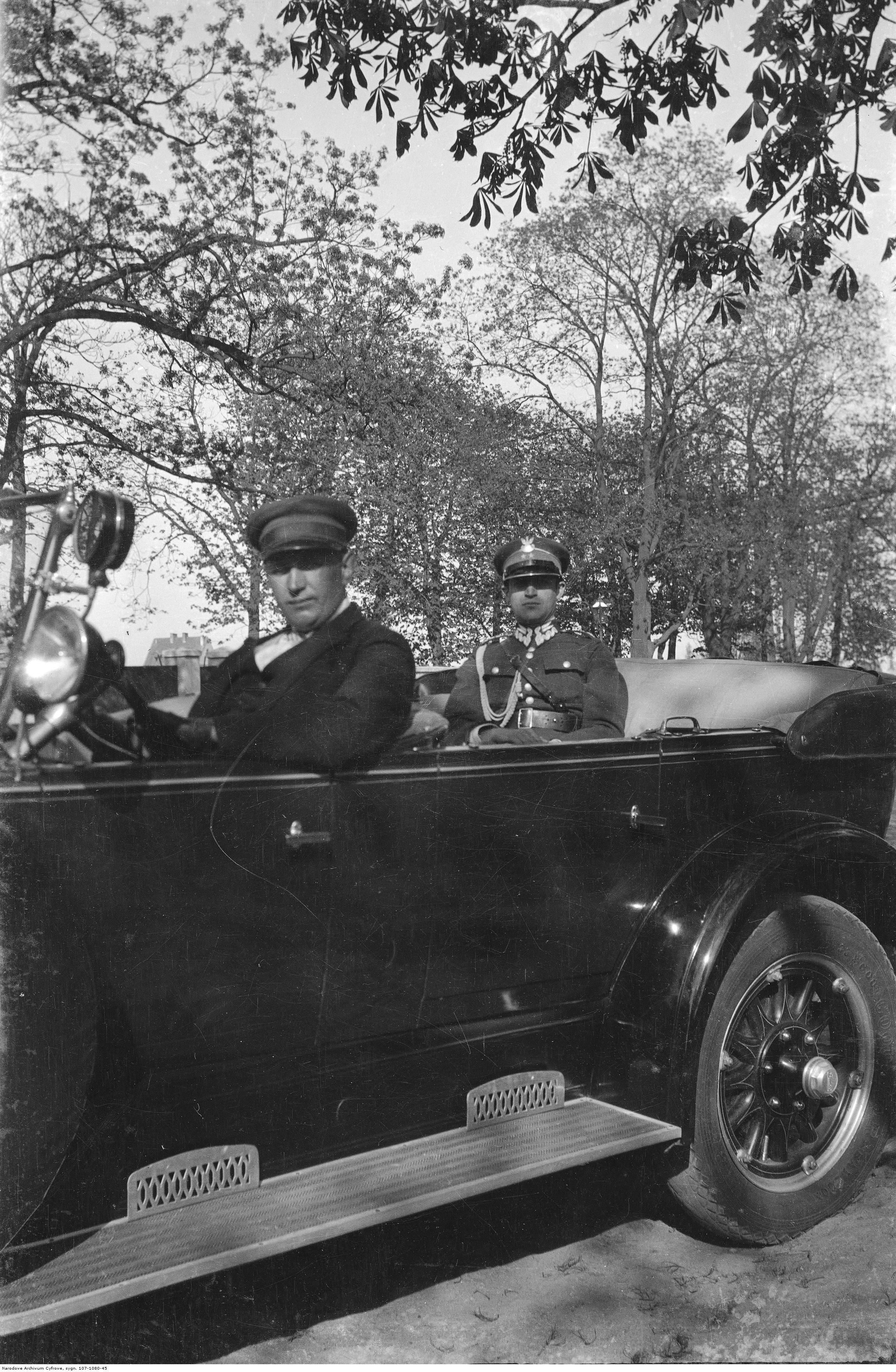 Por. Franciszek Flatau w samochodzie osobowym.